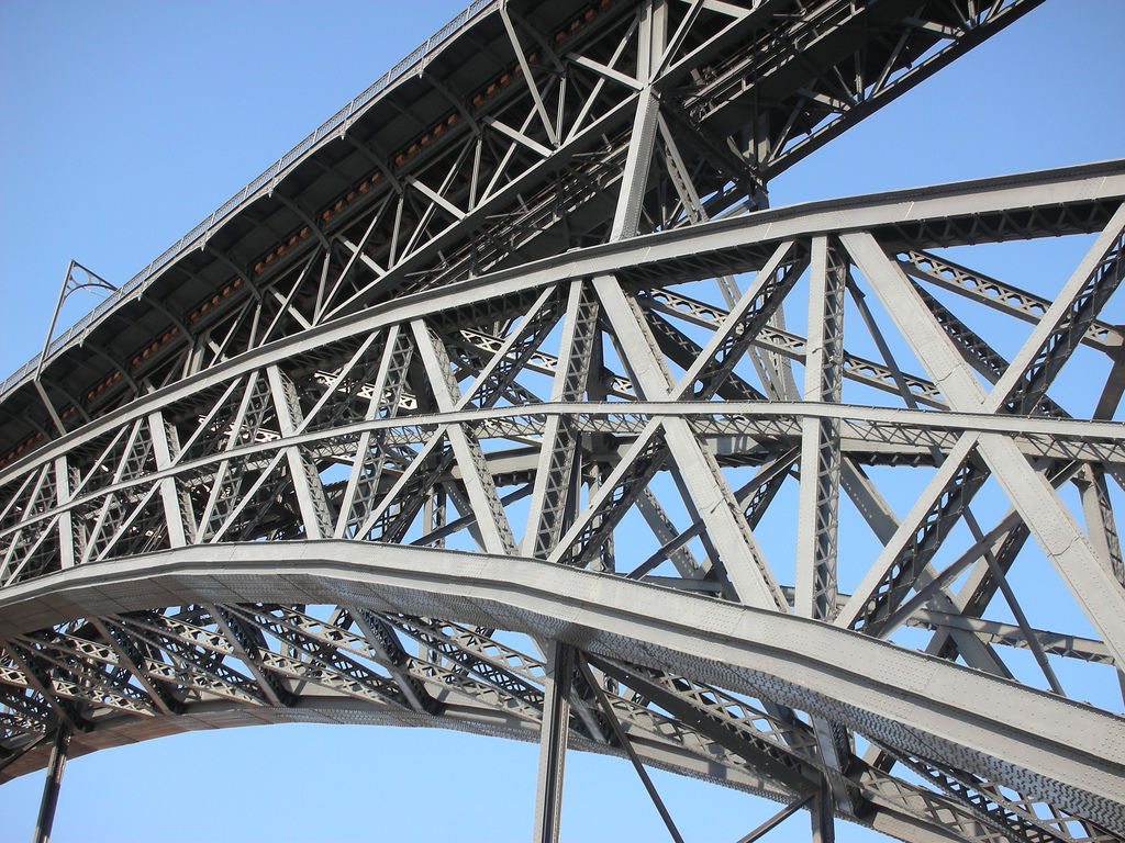 Diseñado por Théophile Seyrig, une la ciudad de Porto con Vilanova de Gaia, donde están las bodegas del famoso vino de Porto.